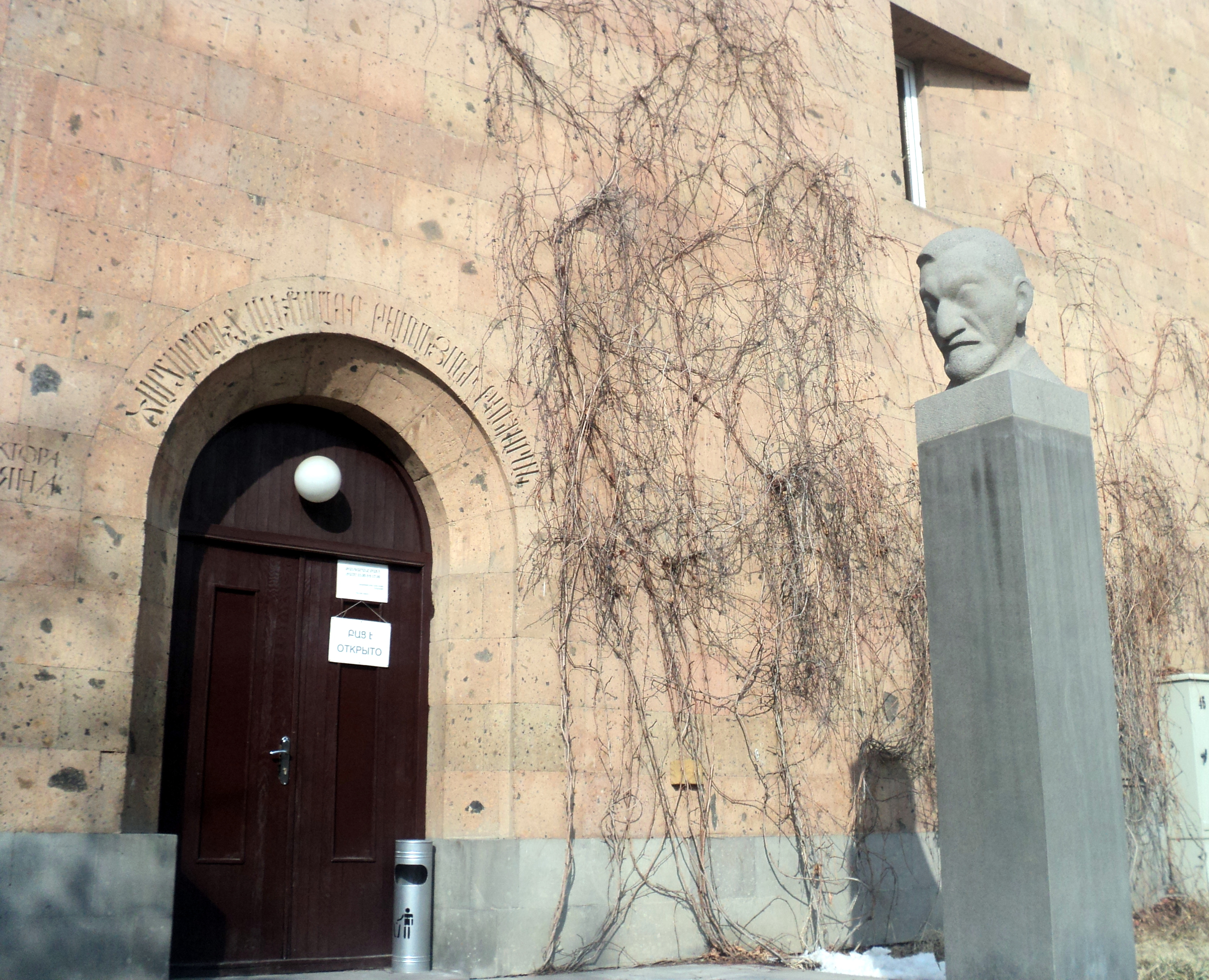 Ալեքսանդր Թամանյանի թանգարան-ինստիտուտ